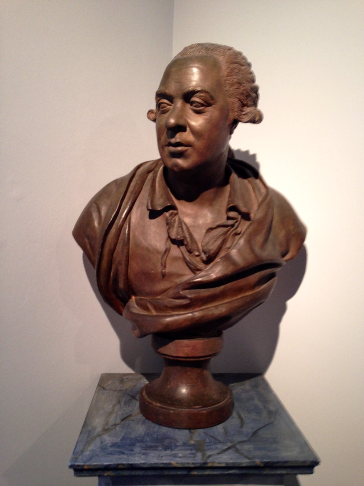 Buste de Charles-Antoine Rougeot, France, XVIIIe siècle, bronze, musée des Beaux-Arts de Tours.